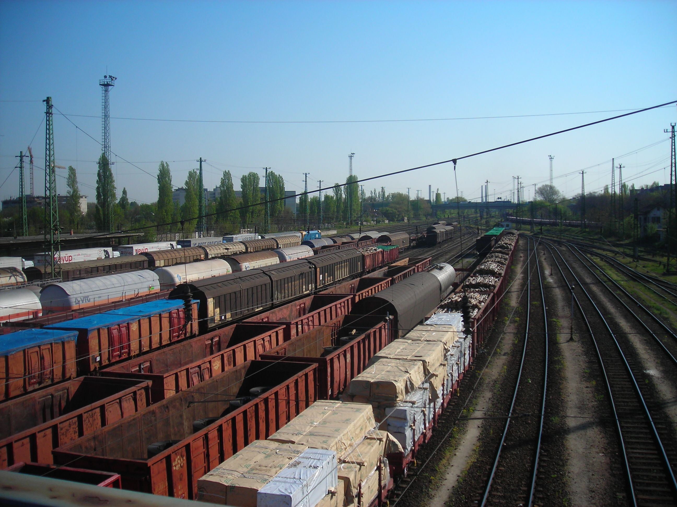 Indulásra várakozó tehervonatok a Ferencvárosi pályaudvaron